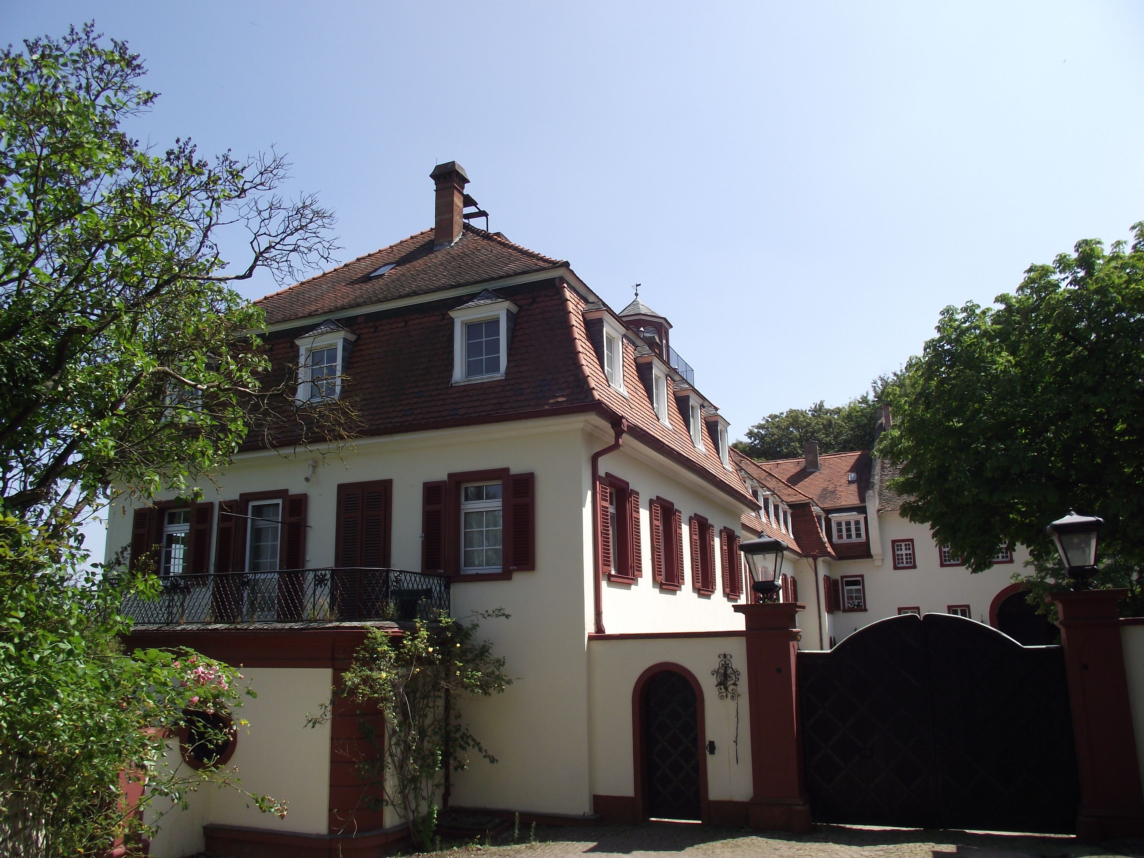 Eingang und östlicher Teil